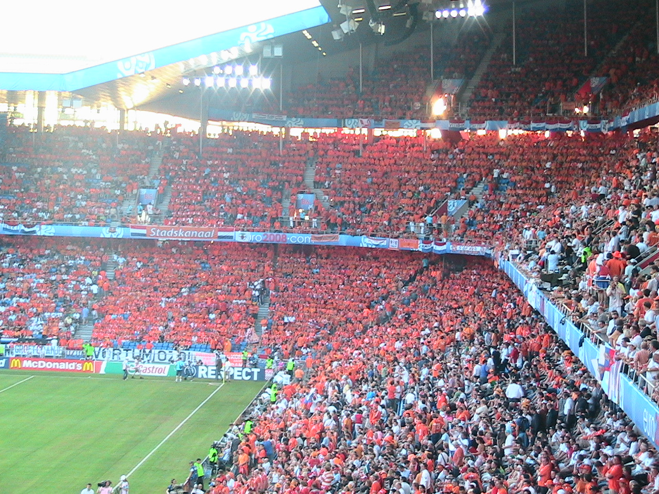 Трибуны стадиона Санкт-Якоб-Парк за несколько минут до начала матча Россия-Нидерланды на Евро-2008